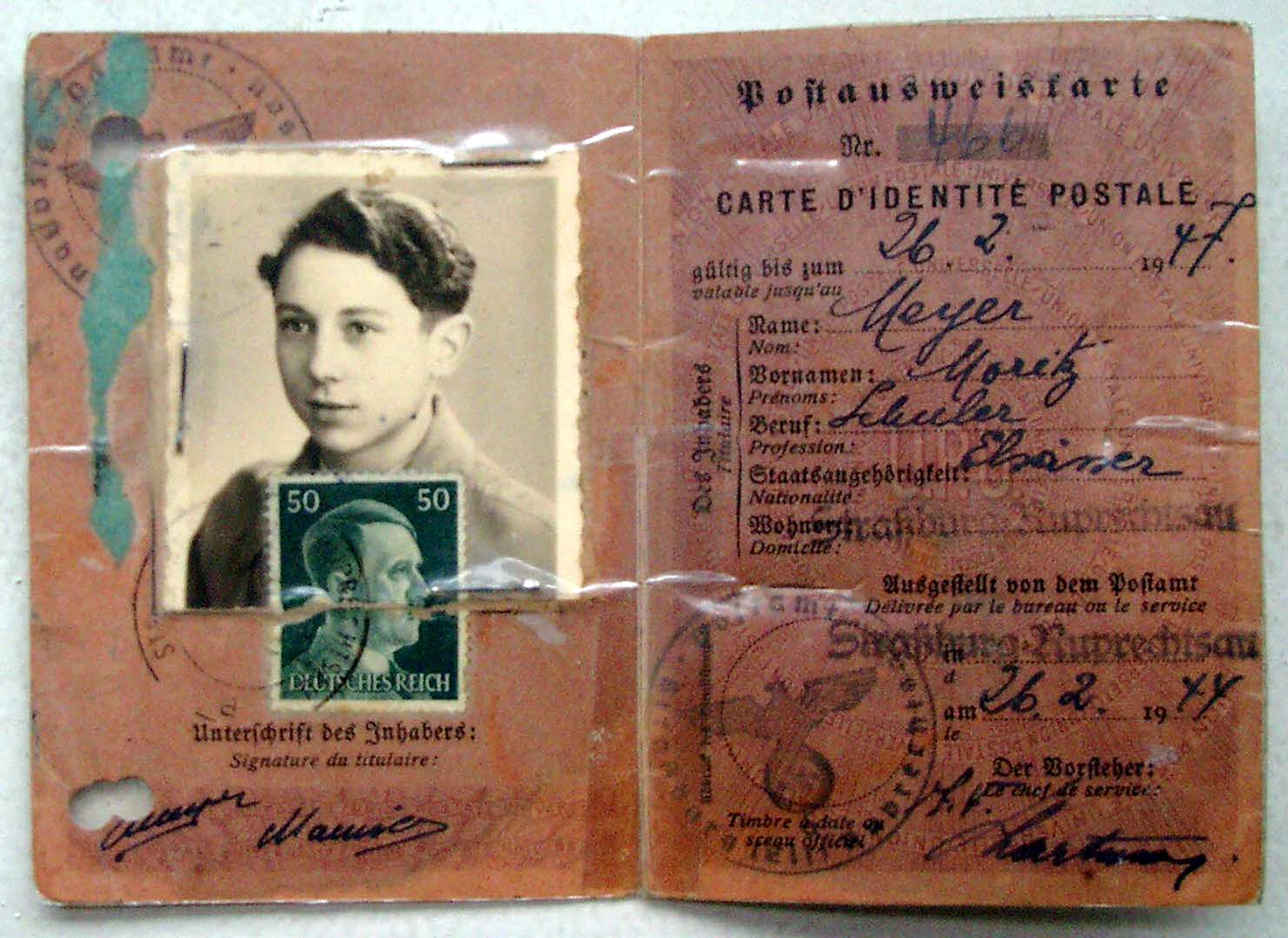 Postausweiskarte (carte d’identité postale) für M. Maurice Meyer, ausgestellt in Straßburg am 26. Februar 1944